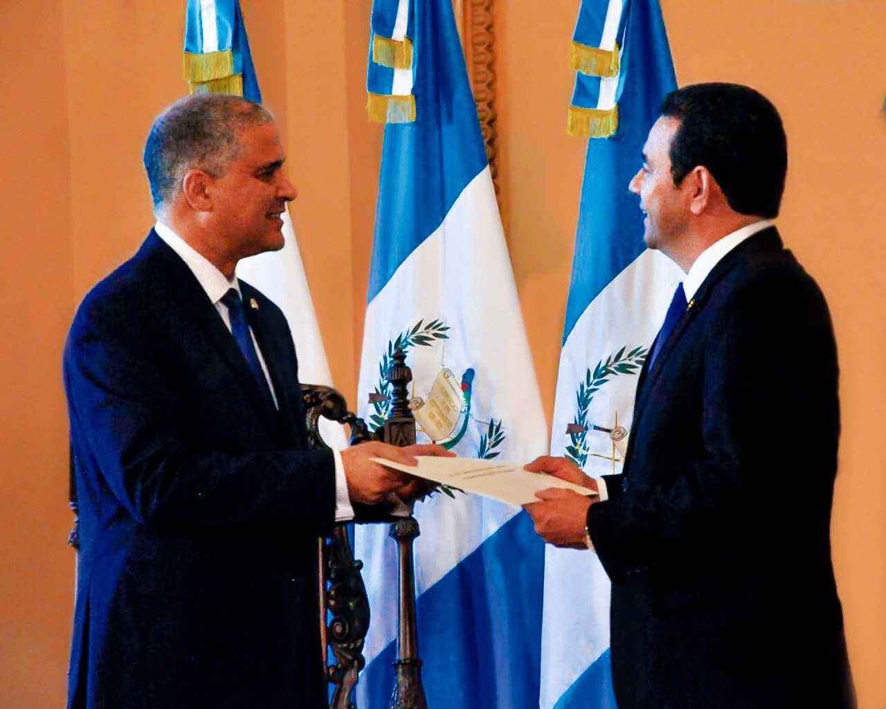 הגשת כתב האמנה לנשיא גואטמלה ג'ימי מוראלס, ספטמבר 2017